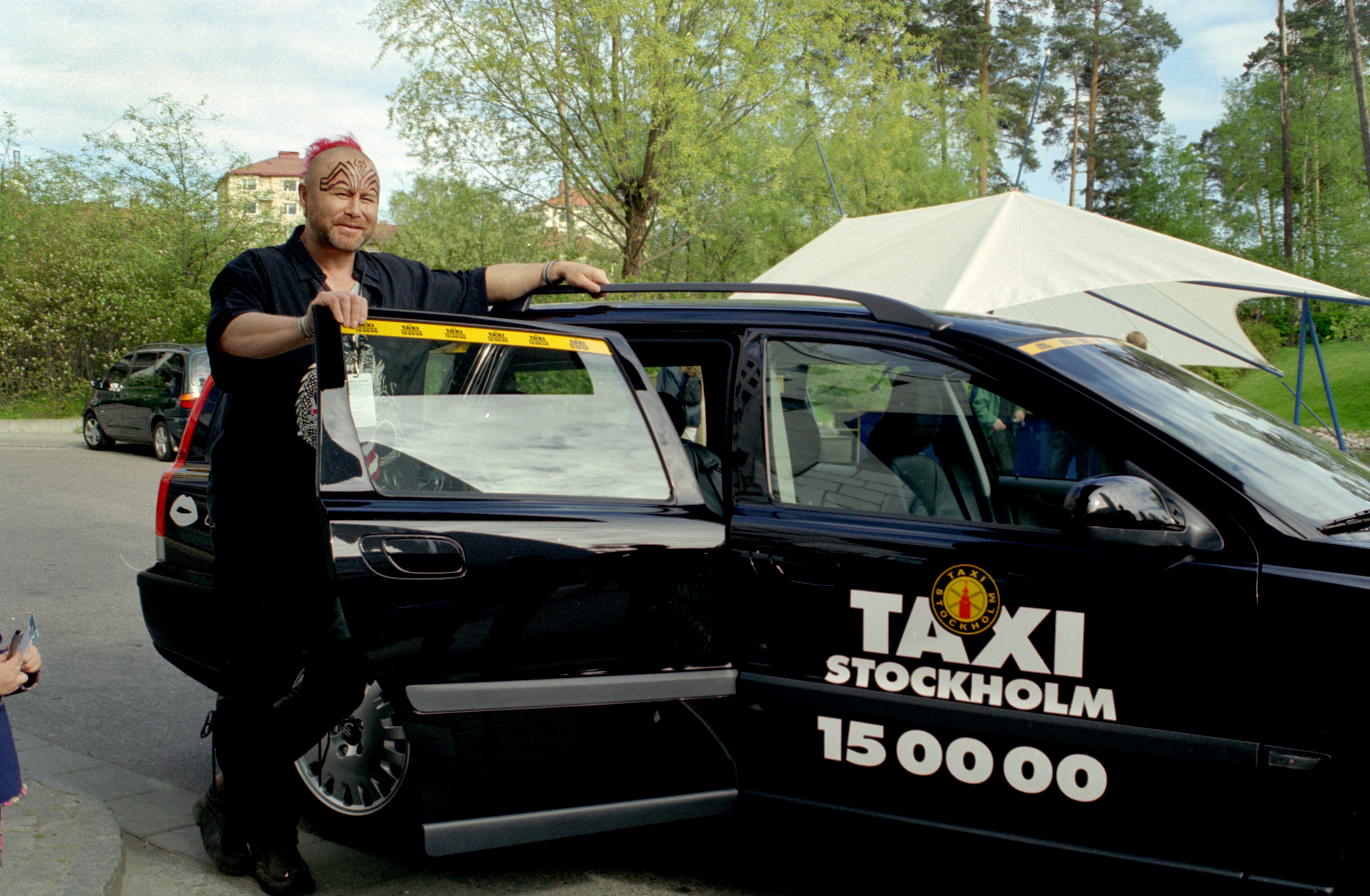 Roger Pontare vid en Taxi Stockholm-bil dagen före finalen i Eurovision Song Contest 2000, Stockholm Gloge Arena, Stockholm 12 maj 2000.